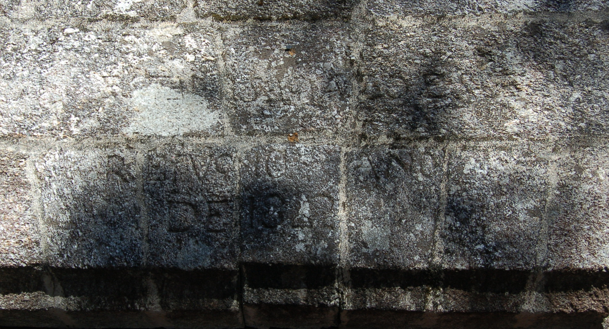 Inscrición na igrexa parroquial de Santa Mariña de Abelenda, no concello de Avión